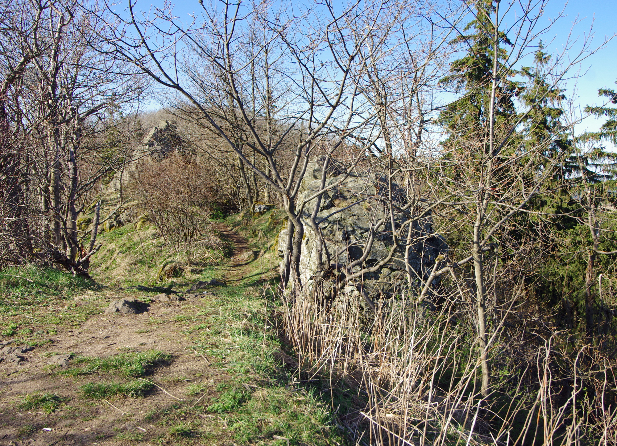 Přírodní rezervace Podhorní vrch, okres Cheb